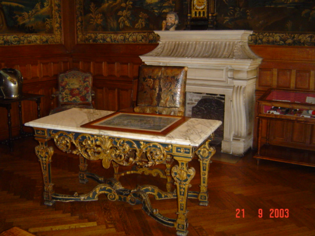 Le cabinet de Jean Guiton .